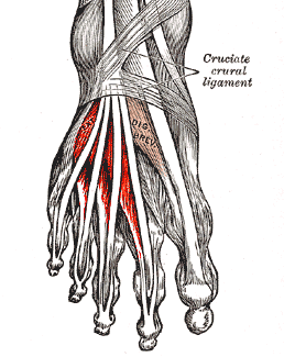 Musculus extensor digitorum brevis